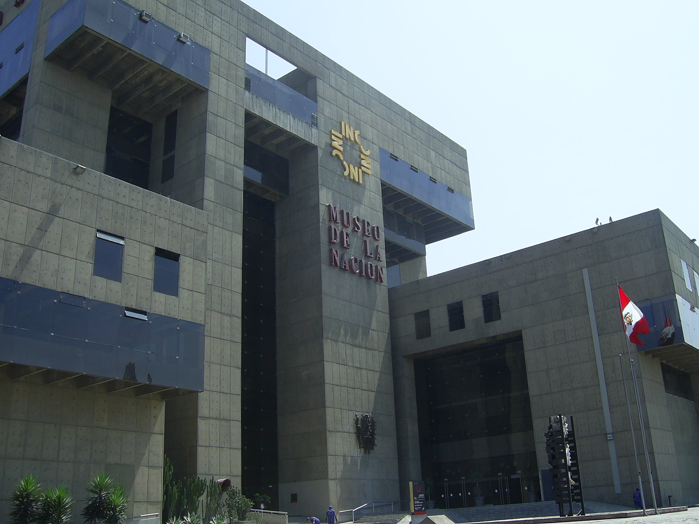 peru national museum main entrance